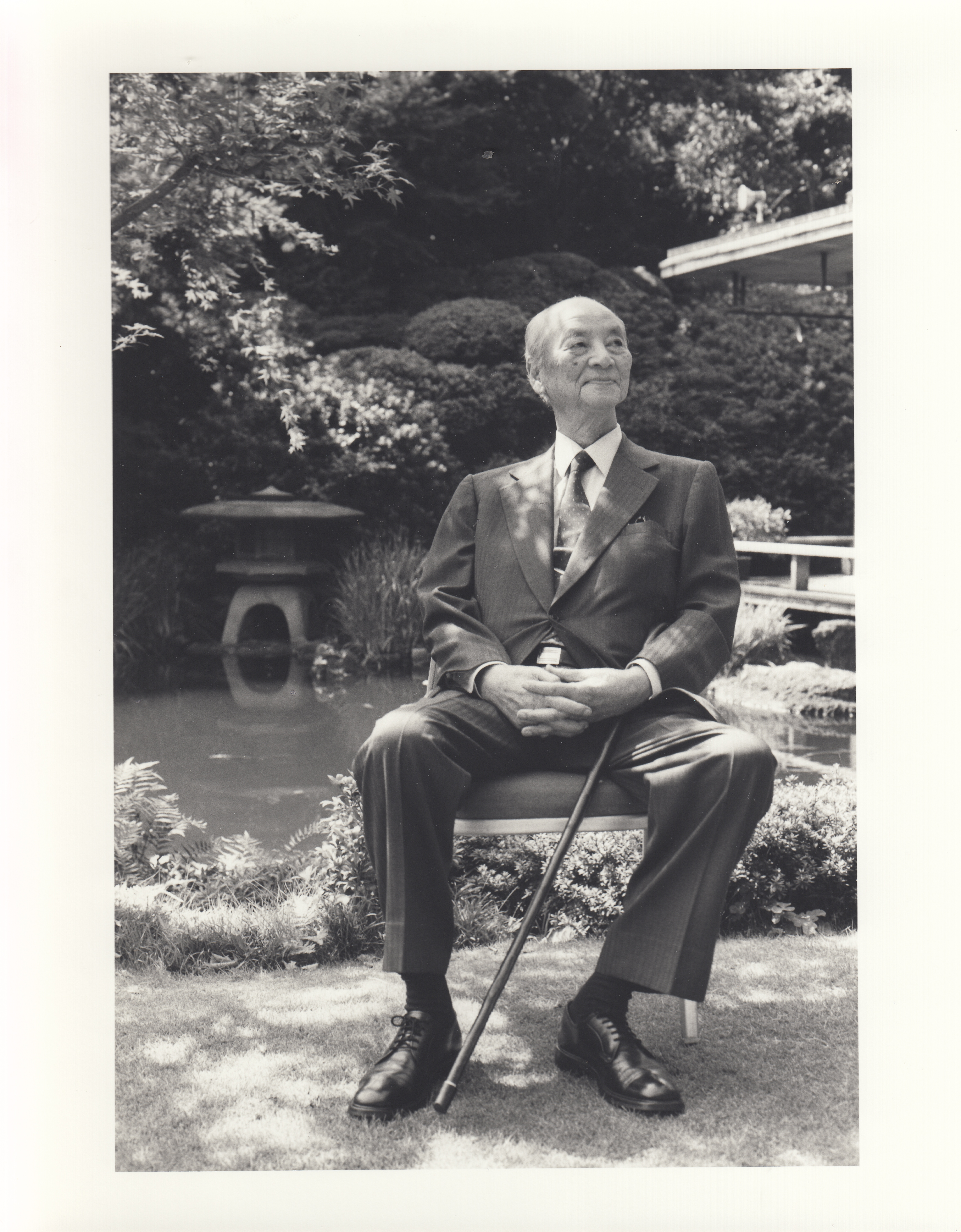 Shigeharu MATSUMOTO